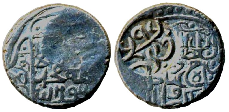 Qaraqoyunlu Həsənəlinin adına zərb edilmiş sikkə.